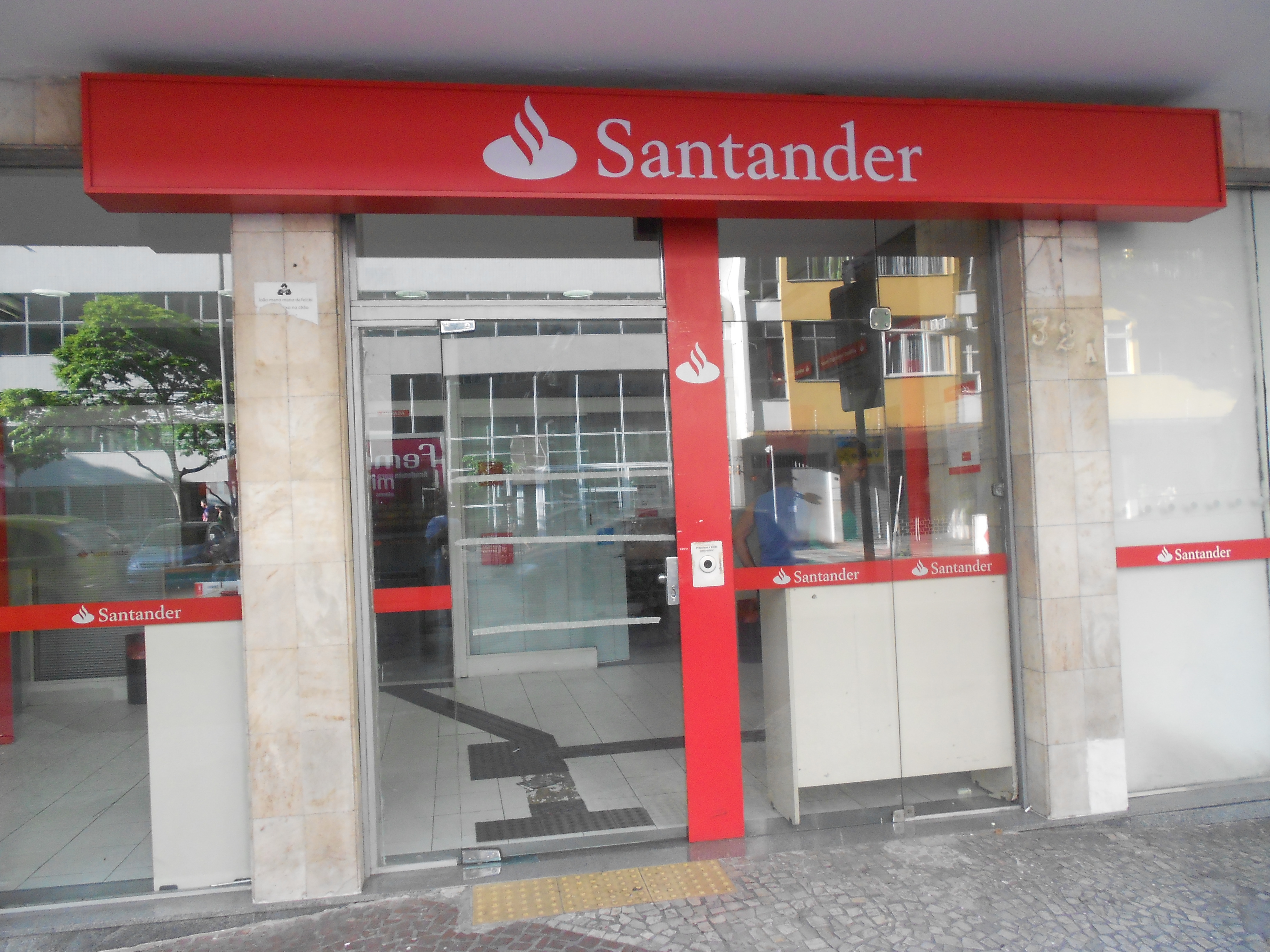 Banco Santander, situado na Rua das Laranjeiras, nº 32, Laranjeiras, Rio de Janeiro, Brasil.